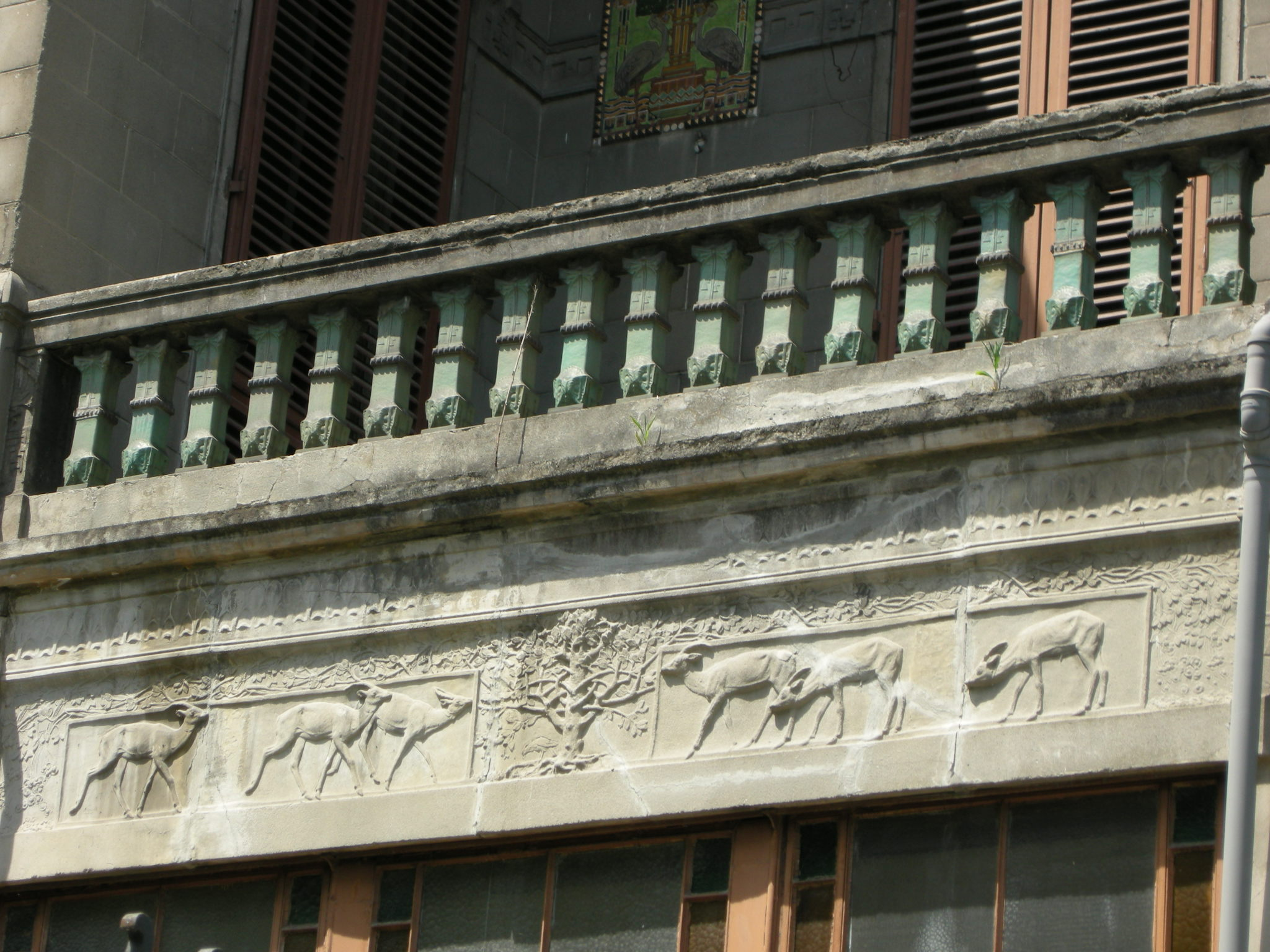 Villa Gioiosa, dettaglio 02 fregio e balaustra policroma